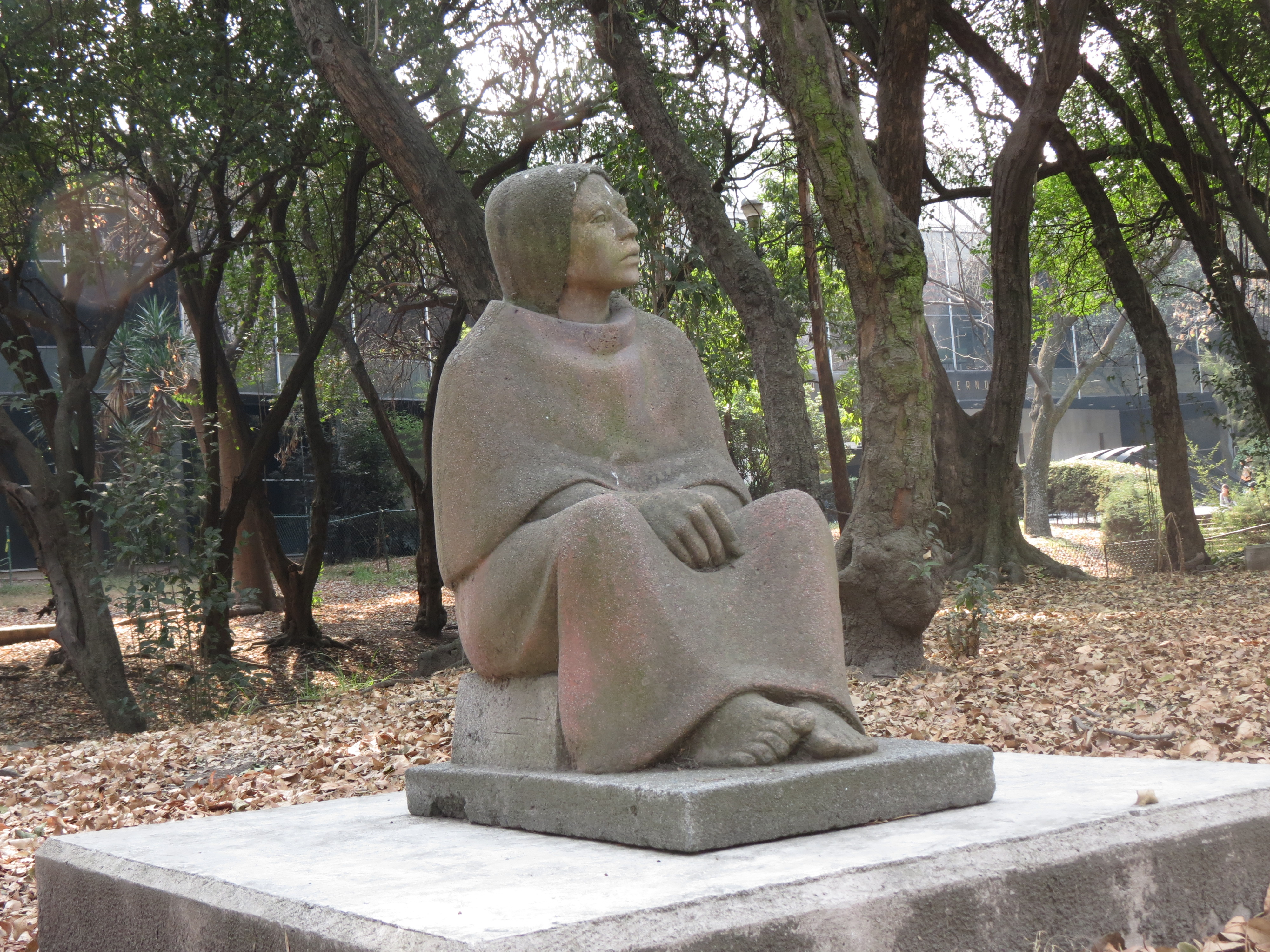 Esculturas en el jardín del Museo de Arte Moderno de la Ciudad de México